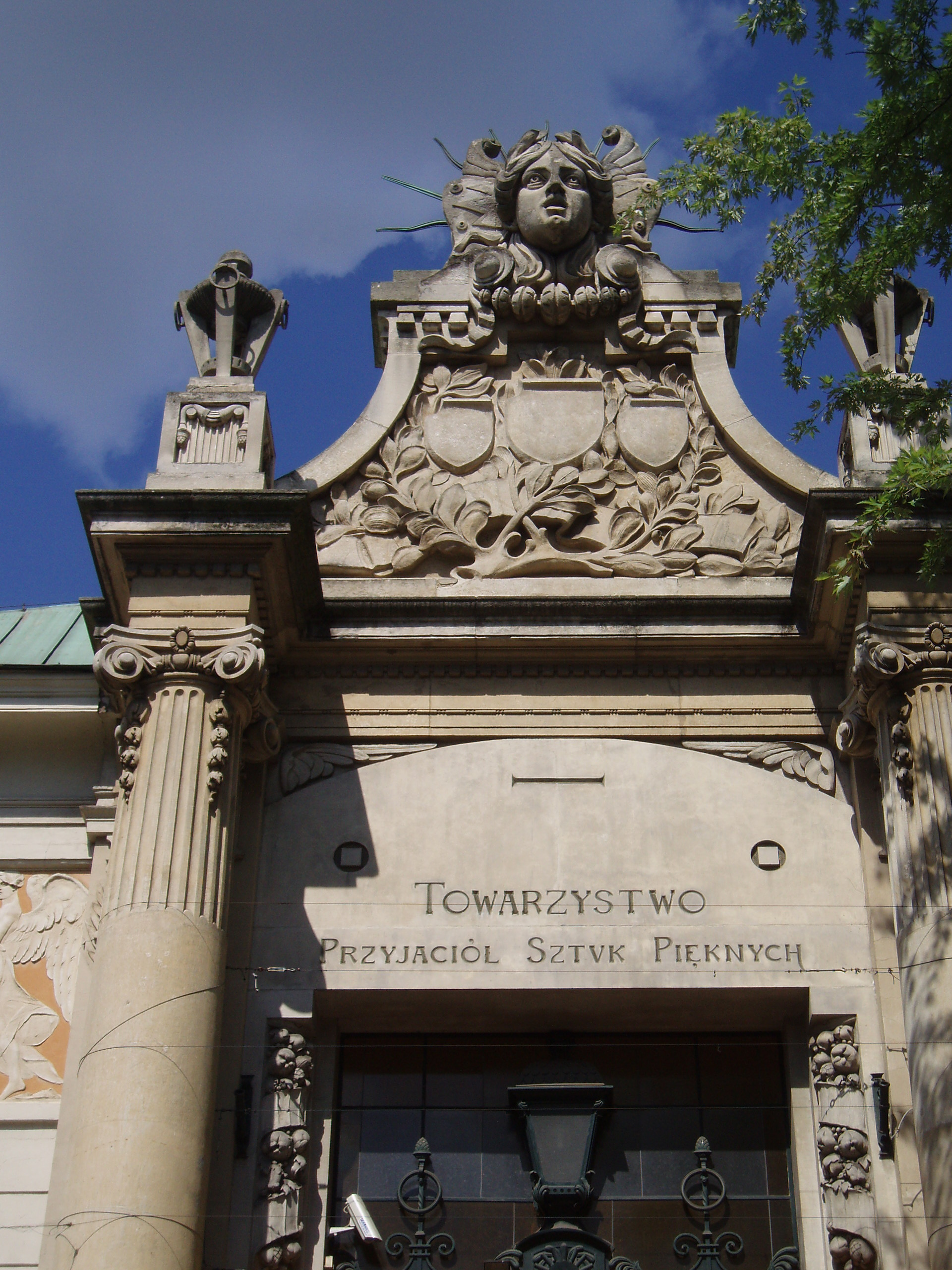 Pałac Sztuki TPSP Kraków, pl. Szczepański 4, Kraków